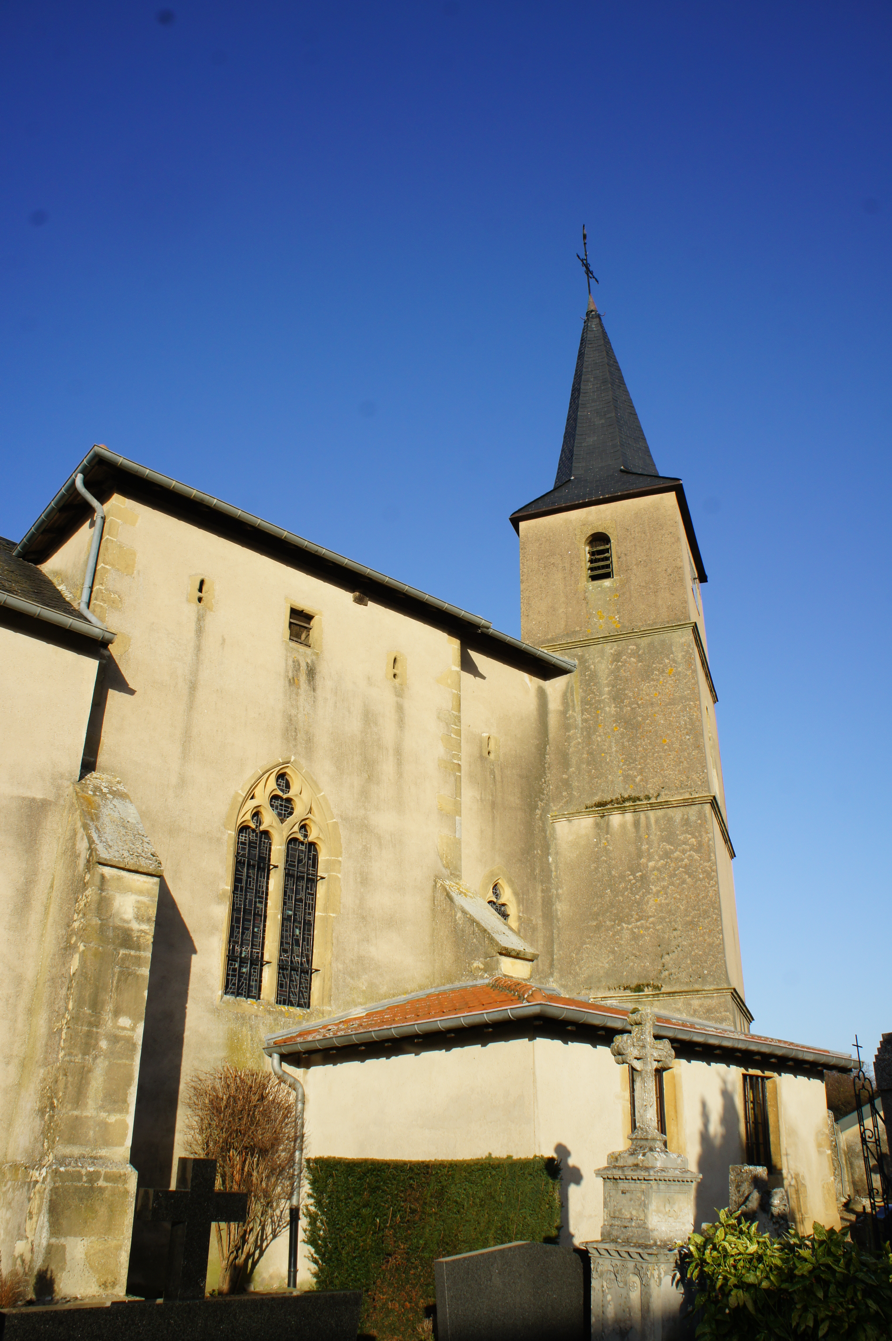 Eglise Saint-Brice de Saulny, Moselle